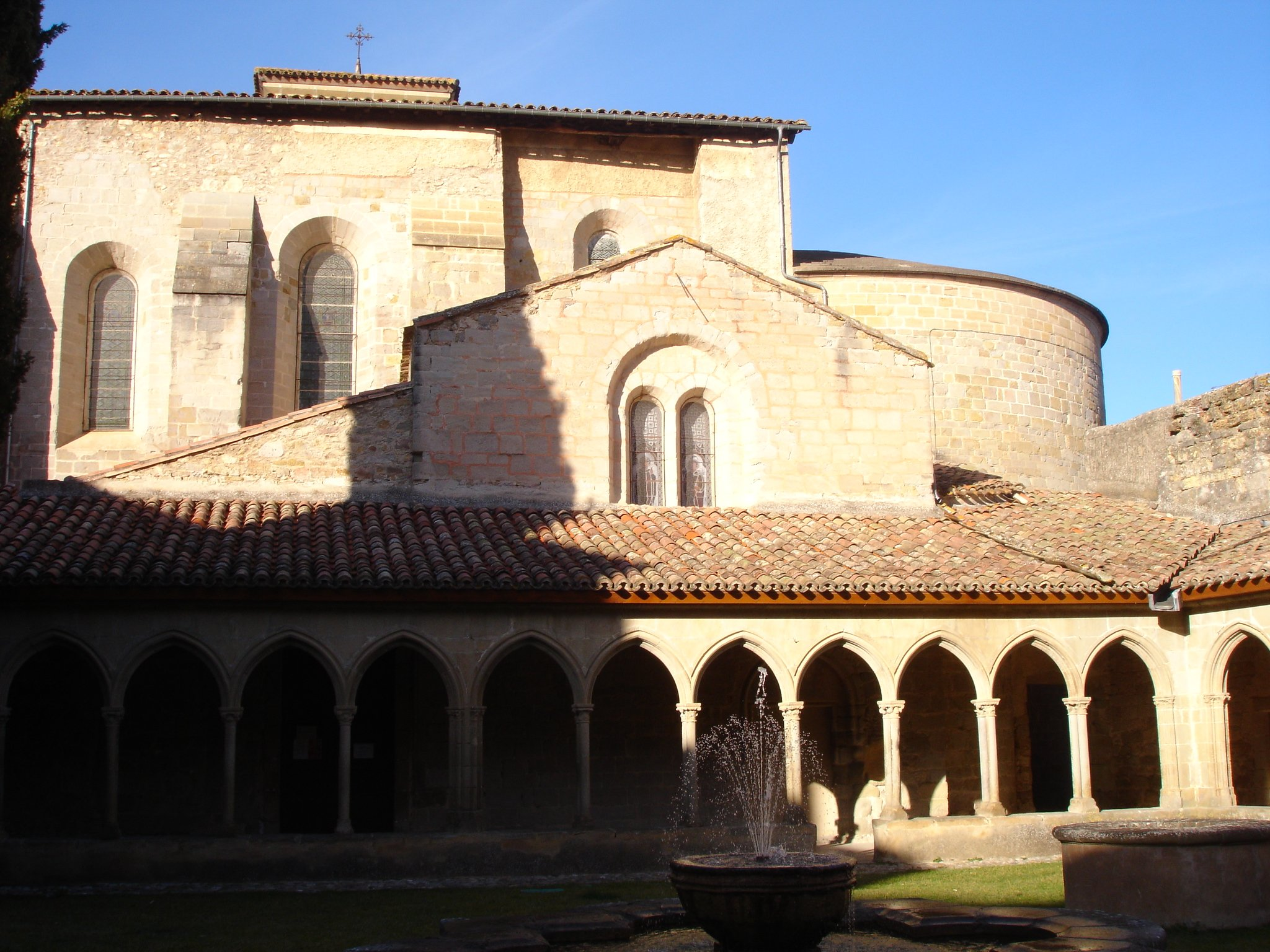 Abbaye de Saint-Hilaire, Aude (11), église